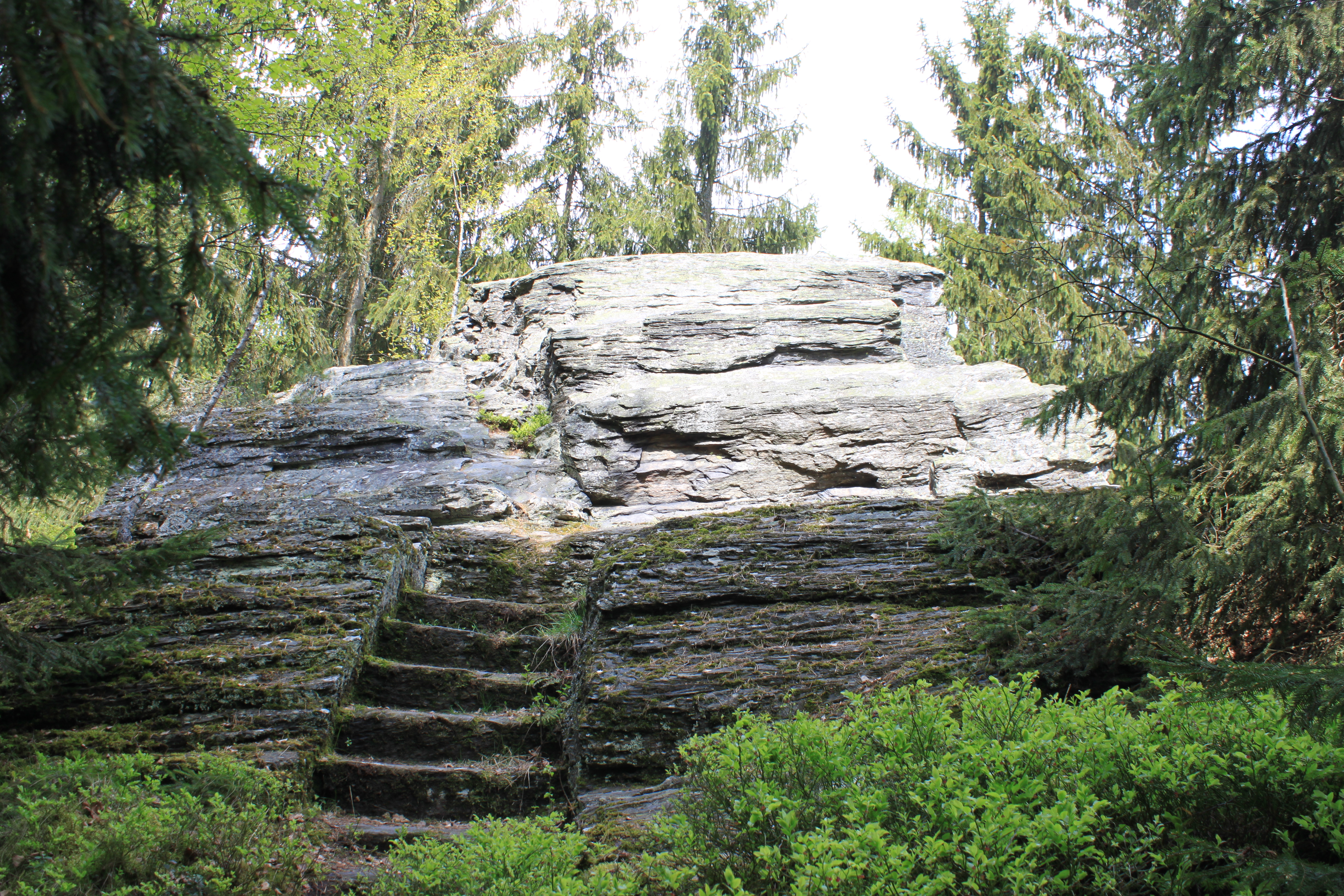 ein natürlicher Phyllitschiefer-Felsen auf einer 686 m großen Anhöhe südöstlich des Dorfes Kleinwendern, Gemeinde Bad Alexandersbad im Landkreis Wunsiedel im Fichtelgebirge (Oberfranken), Südseite